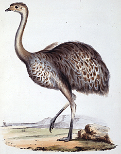 Rhea darwinii (Pterocnemia pennata)